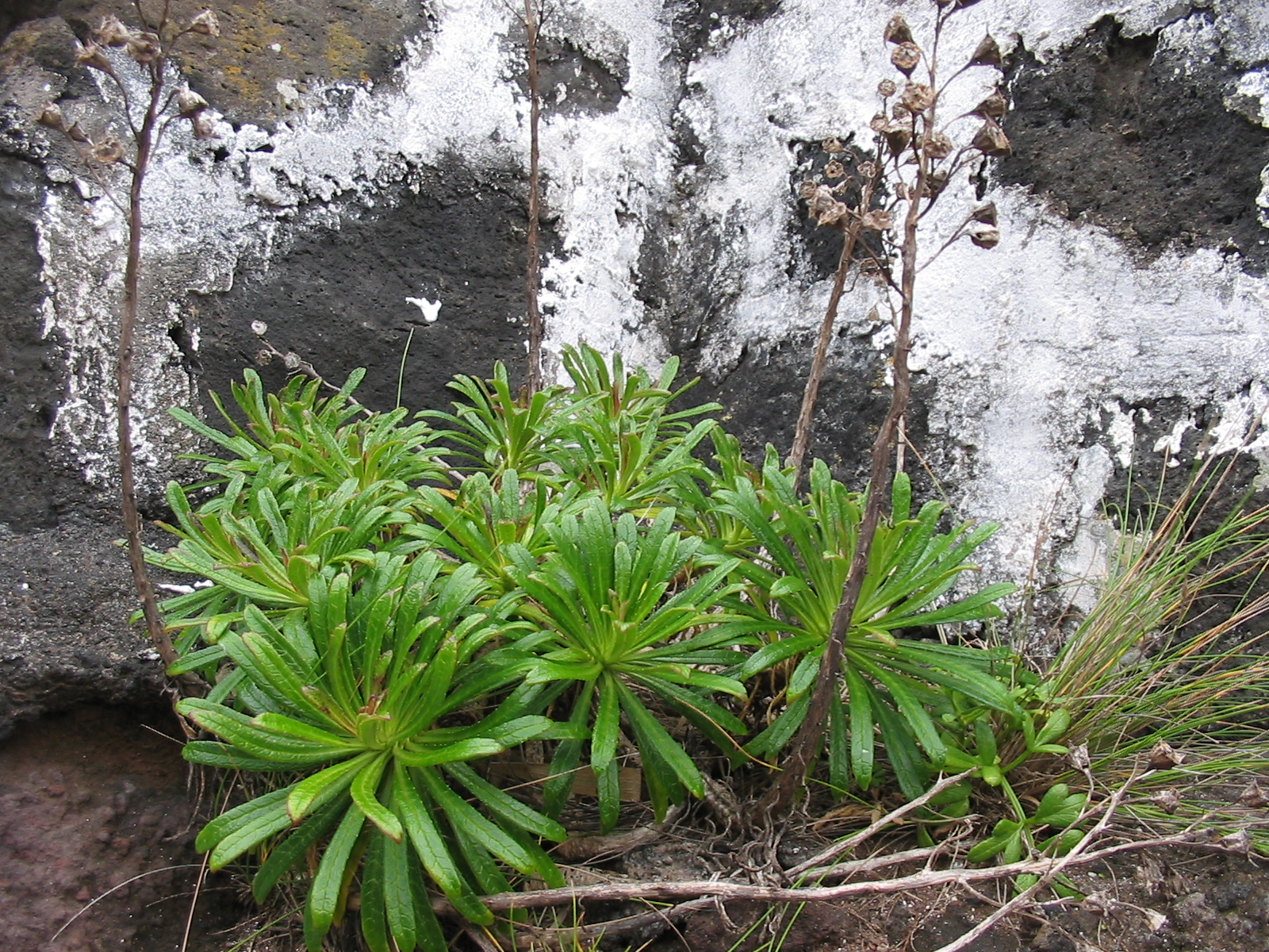 Azoren-Glockenblume (Azorina vidalii) - Habitus